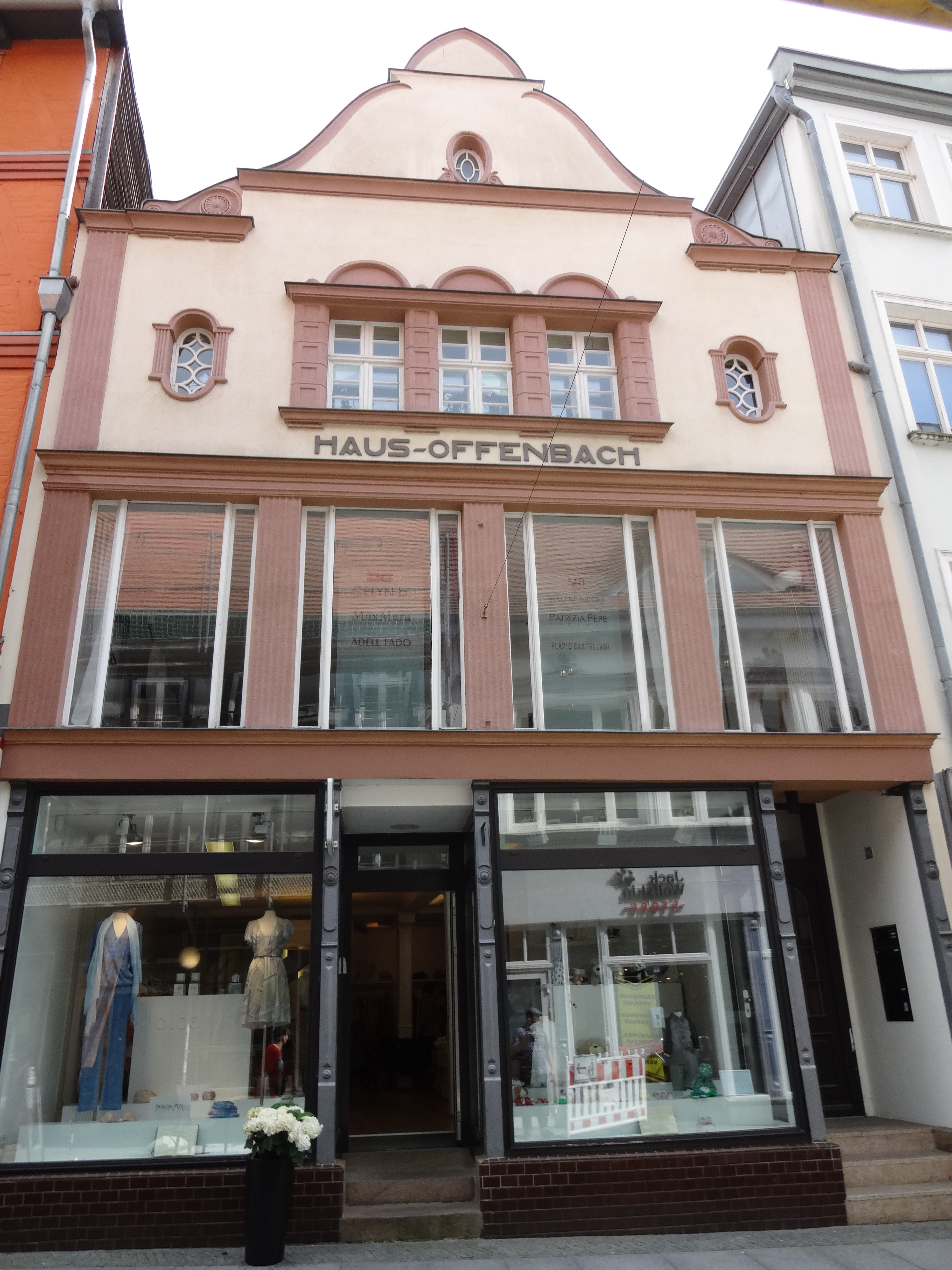 Denkmalgeschütztes Geschäftshaus (Haus Offenbach) in der Schmiedestraße 16 in Schwerin